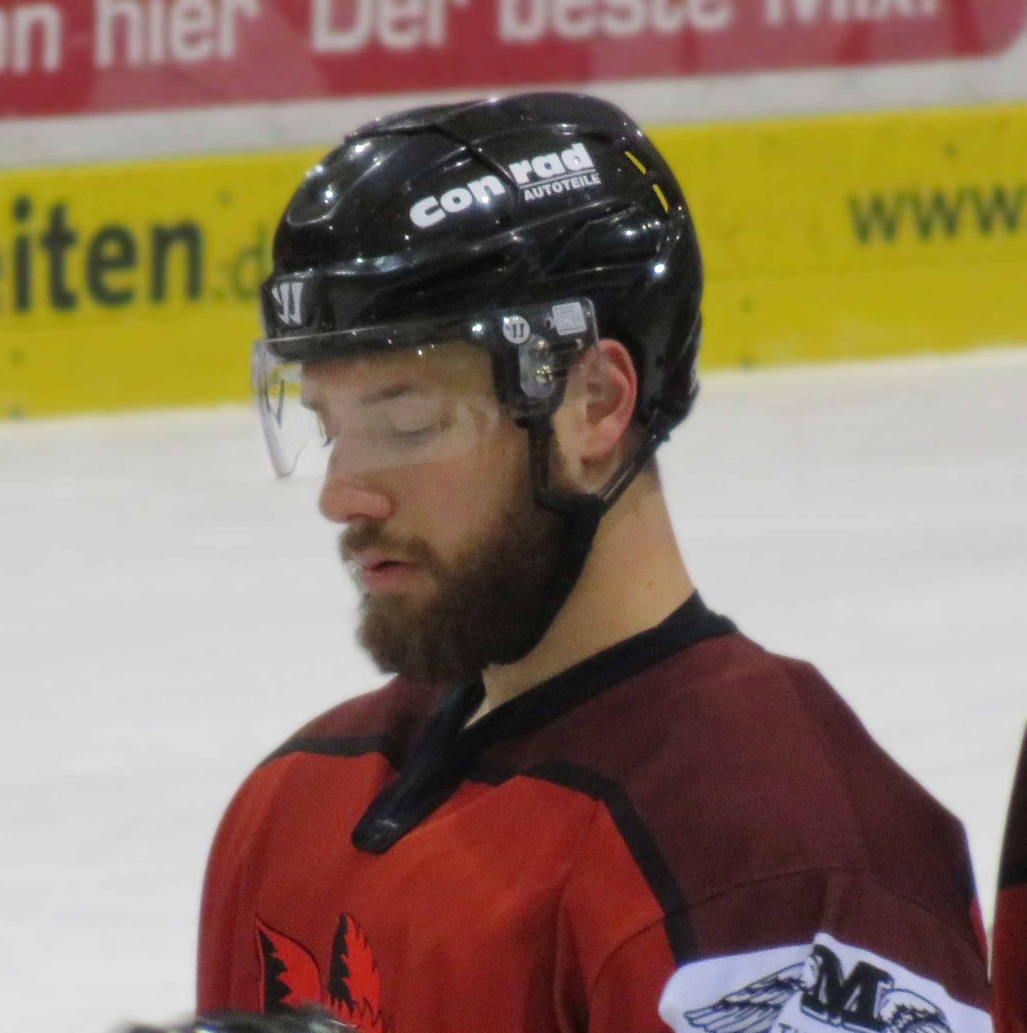 Andre Huebscher